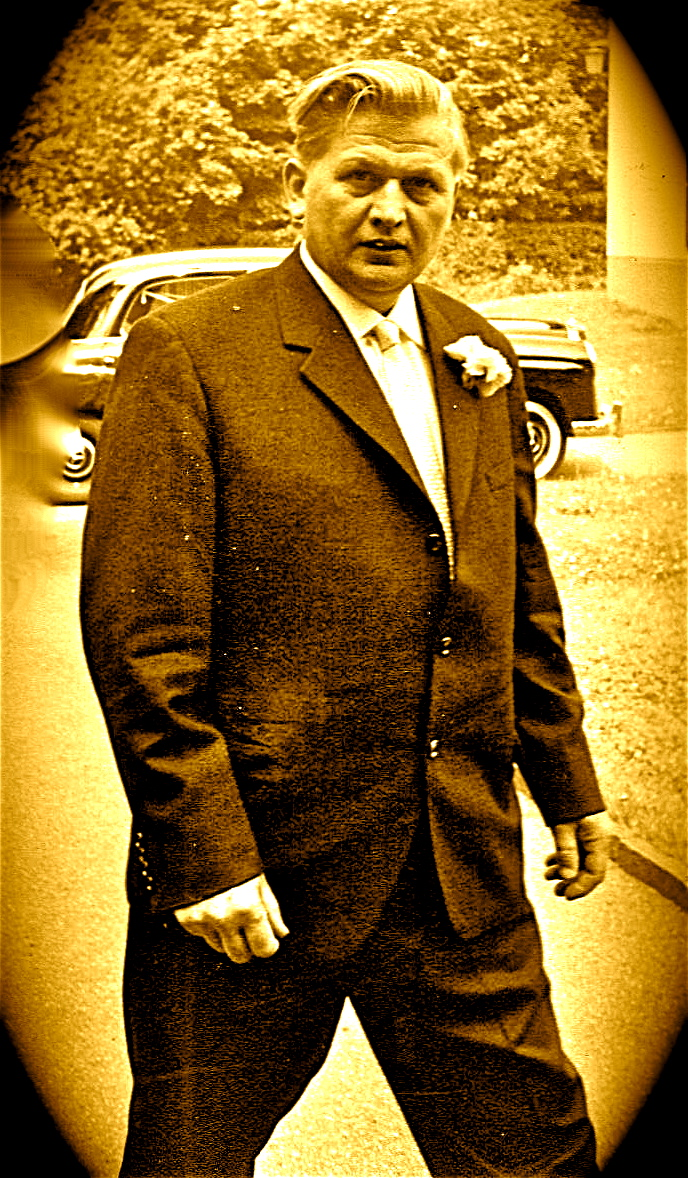 1962 Aufnahme von Viktor Müller aus Solingen geb. 11.03.1913 - 10.11.1967